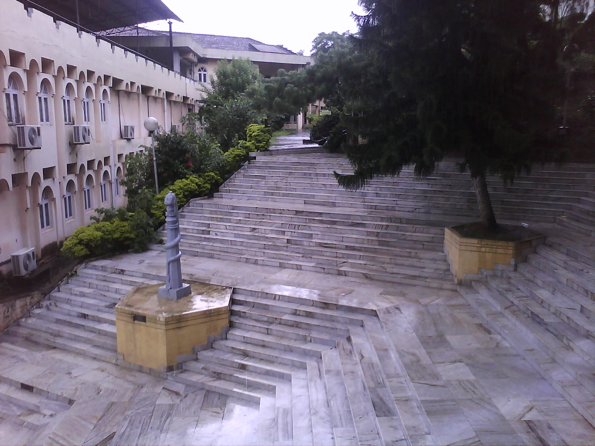 অসমীয়া: শ্ৰীমন্ত শংকৰদেৱ কলাক্ষেত্ৰৰ এক দৃশ্য